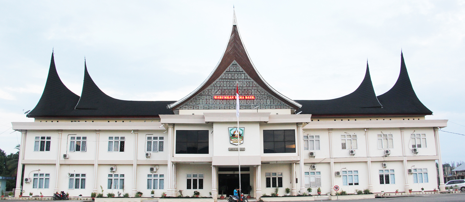 Kantor Bupati Darmasraya